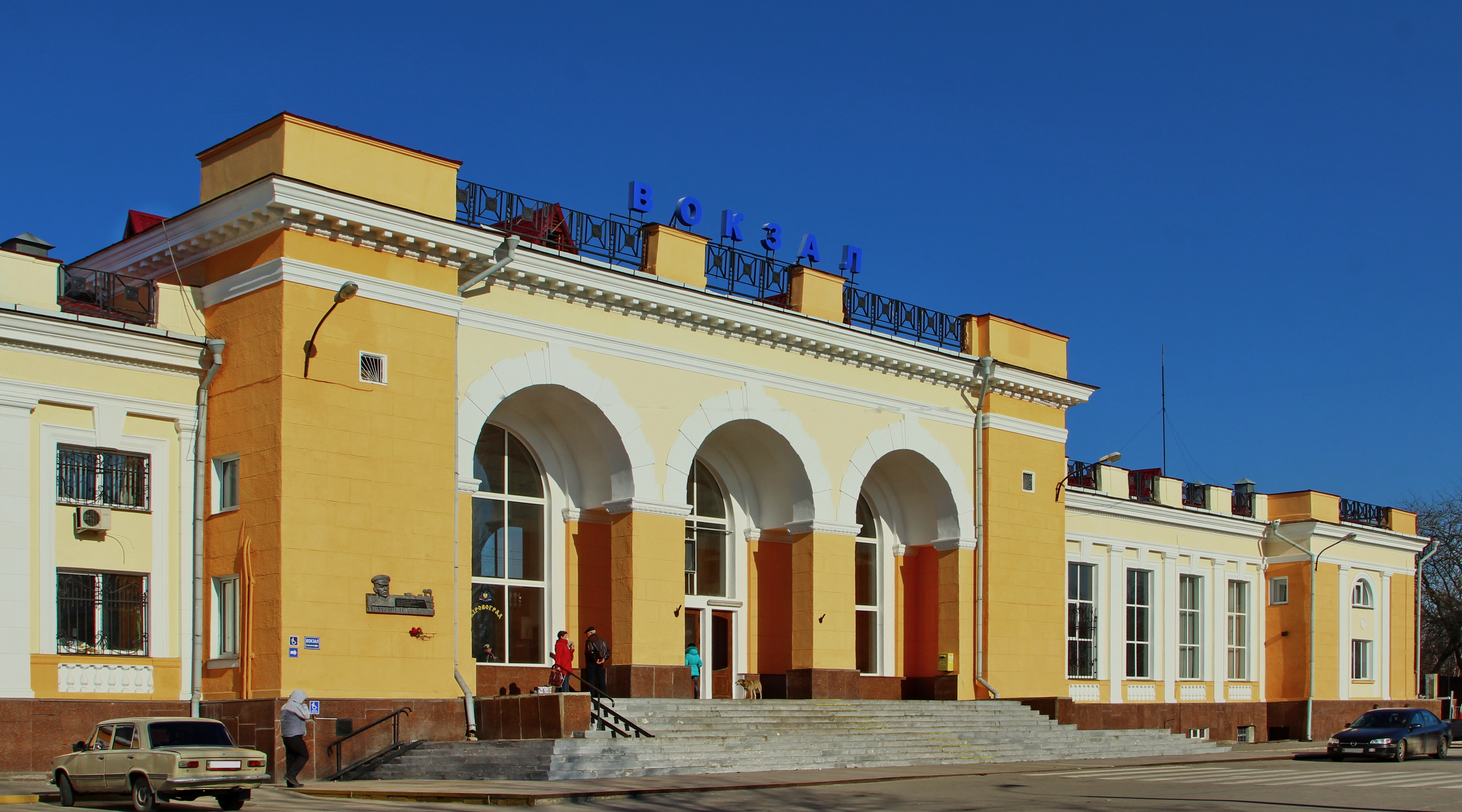 Залізничний вокзал міста Кіровограда